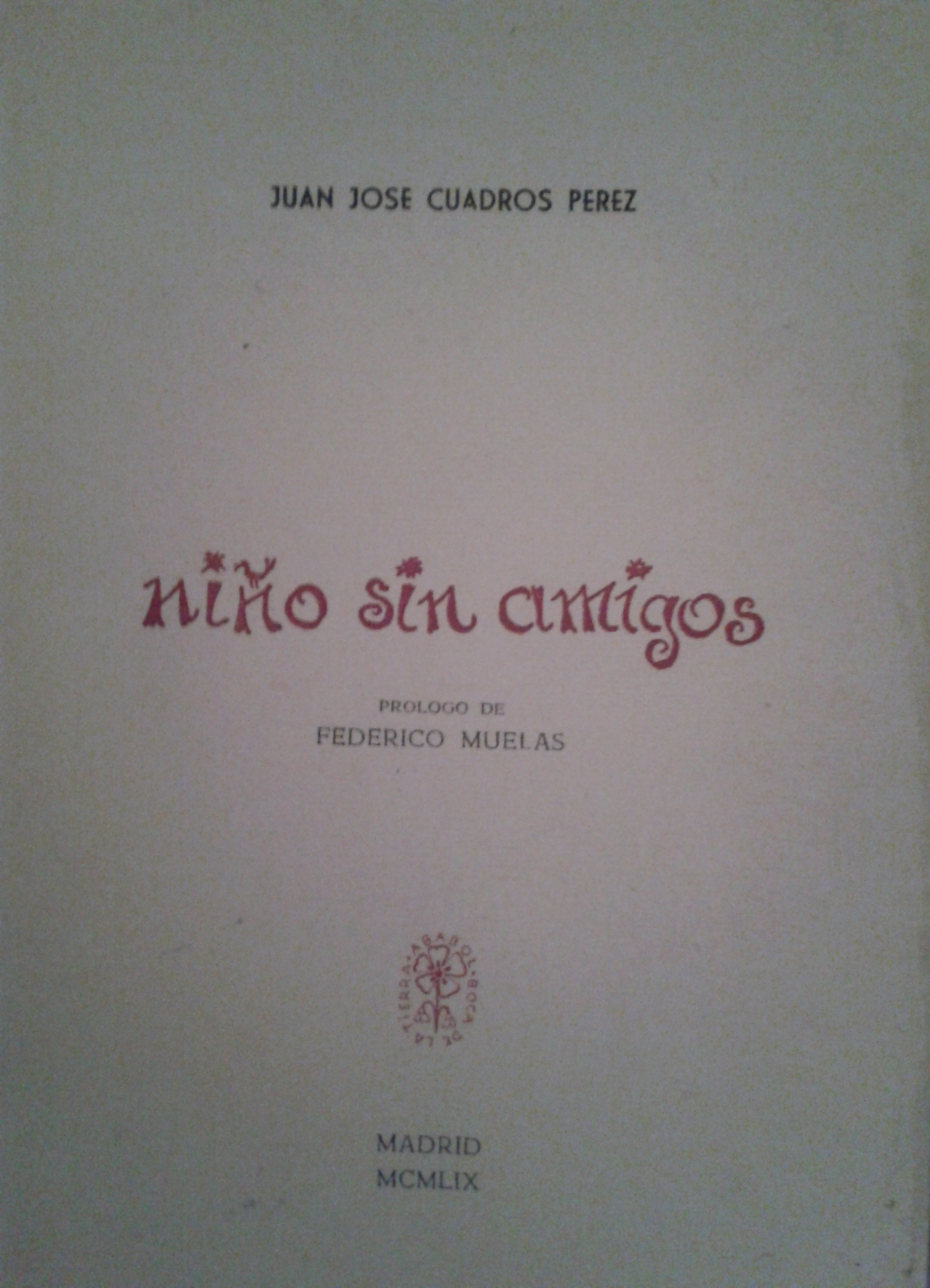 Niño sin amigos de Juan José Cuadros, año 1959